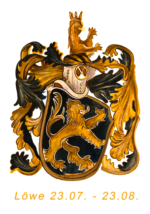 Leu-zodiac